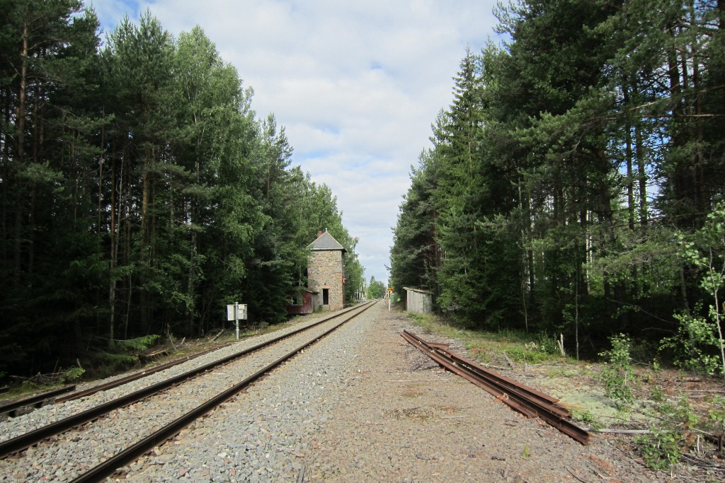 Vanntårn nord for Jømna stasjon